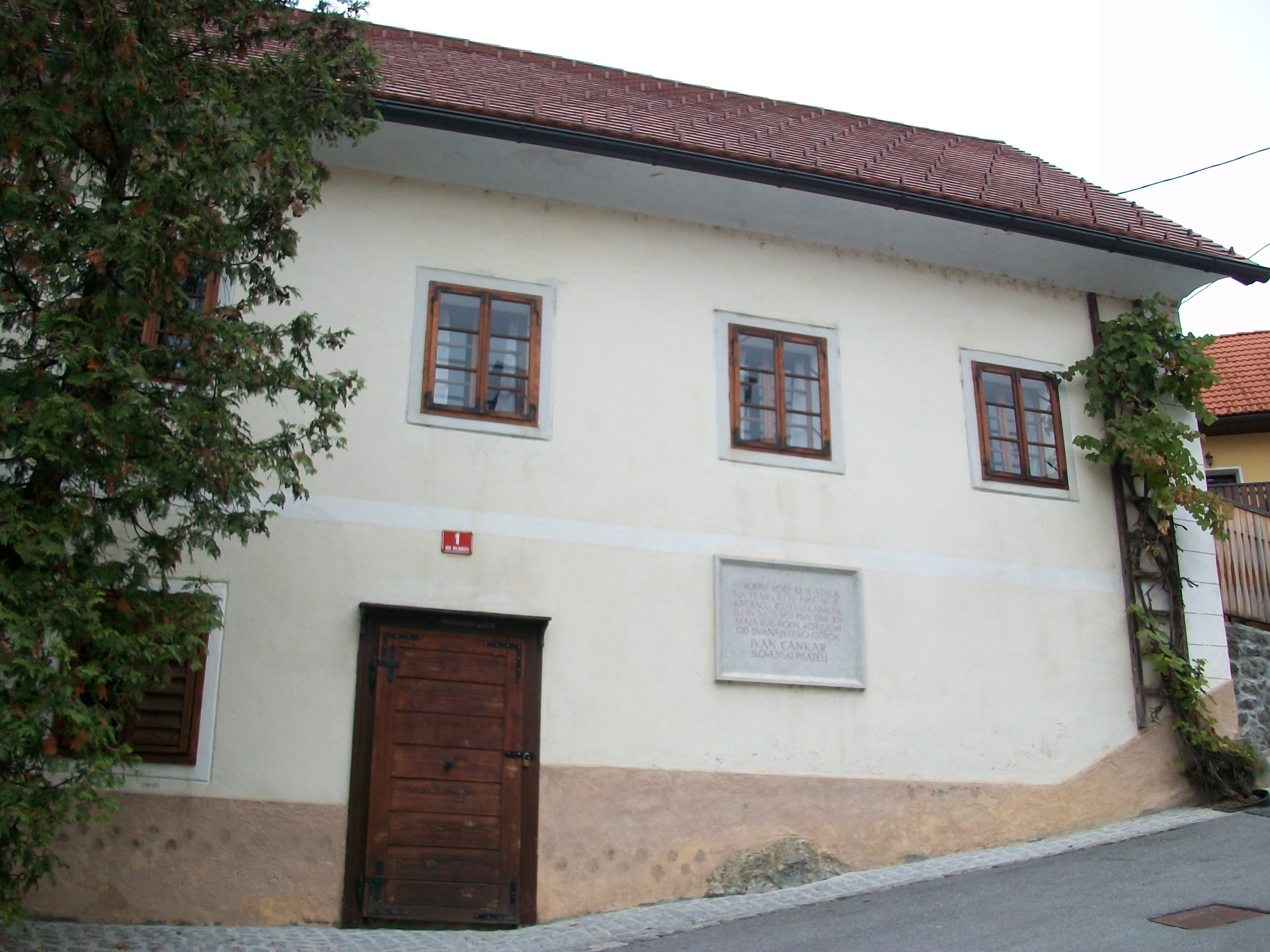 Rojstna hiša Ivana Cankarja na Vrhniki.